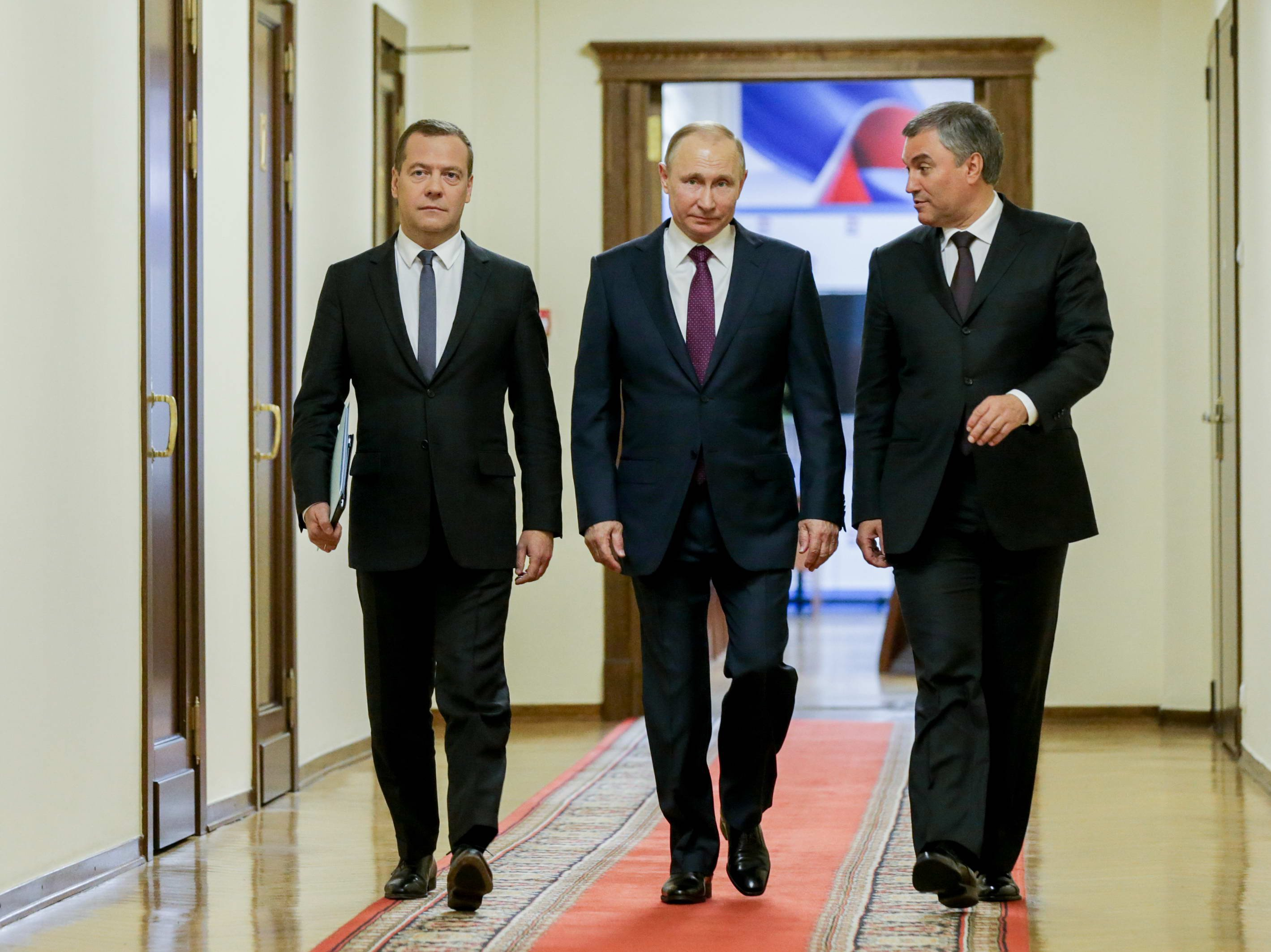 и.о. председателя правительства Д.А. Медведев, президент В.В. Путин и председатель Государственной думы В.В. Володин в Государственной думе 8 мая 2018 года